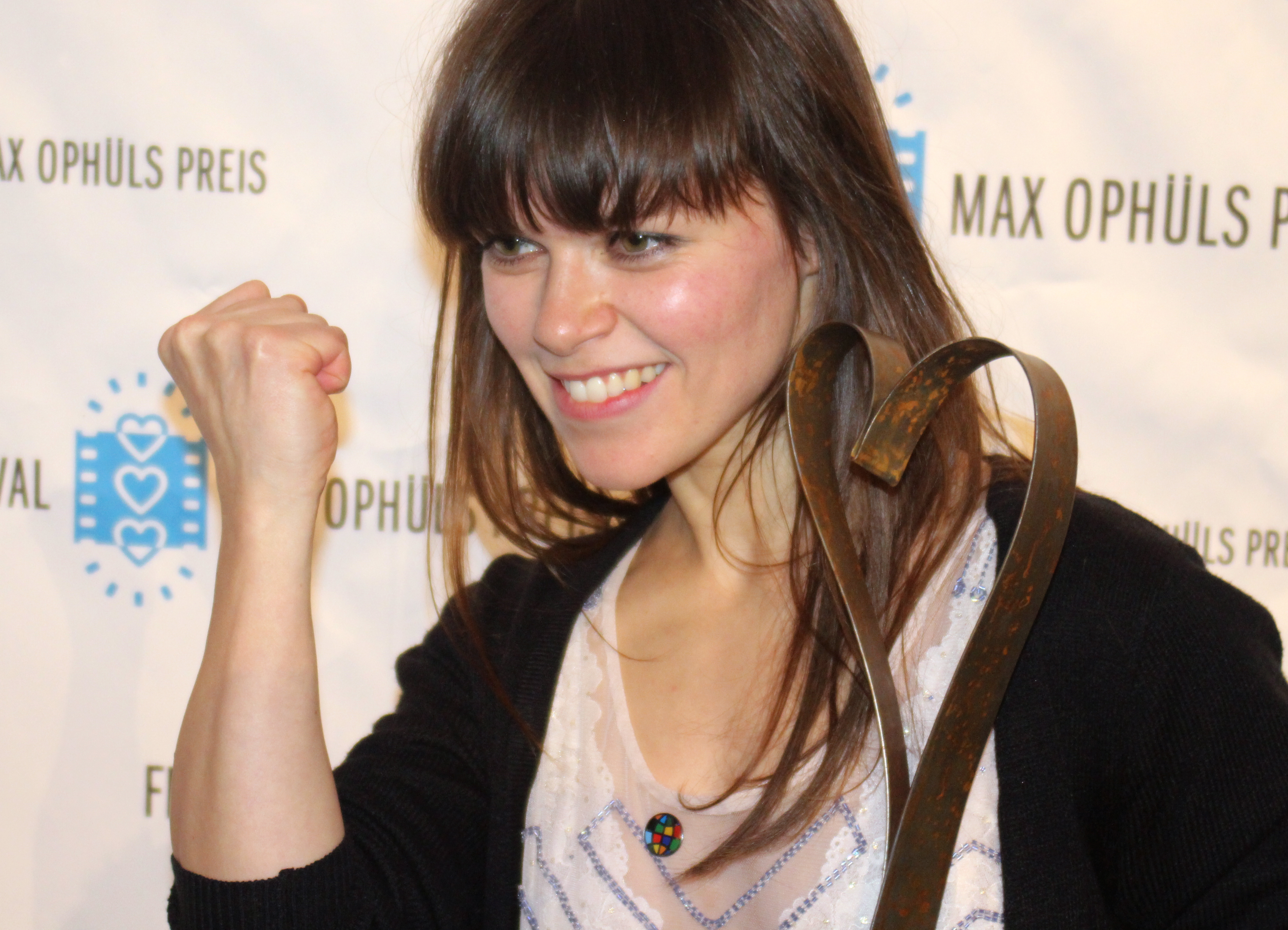 Lore Richter nach der Preisverleihung des Max-Ophüls-Preis 2015